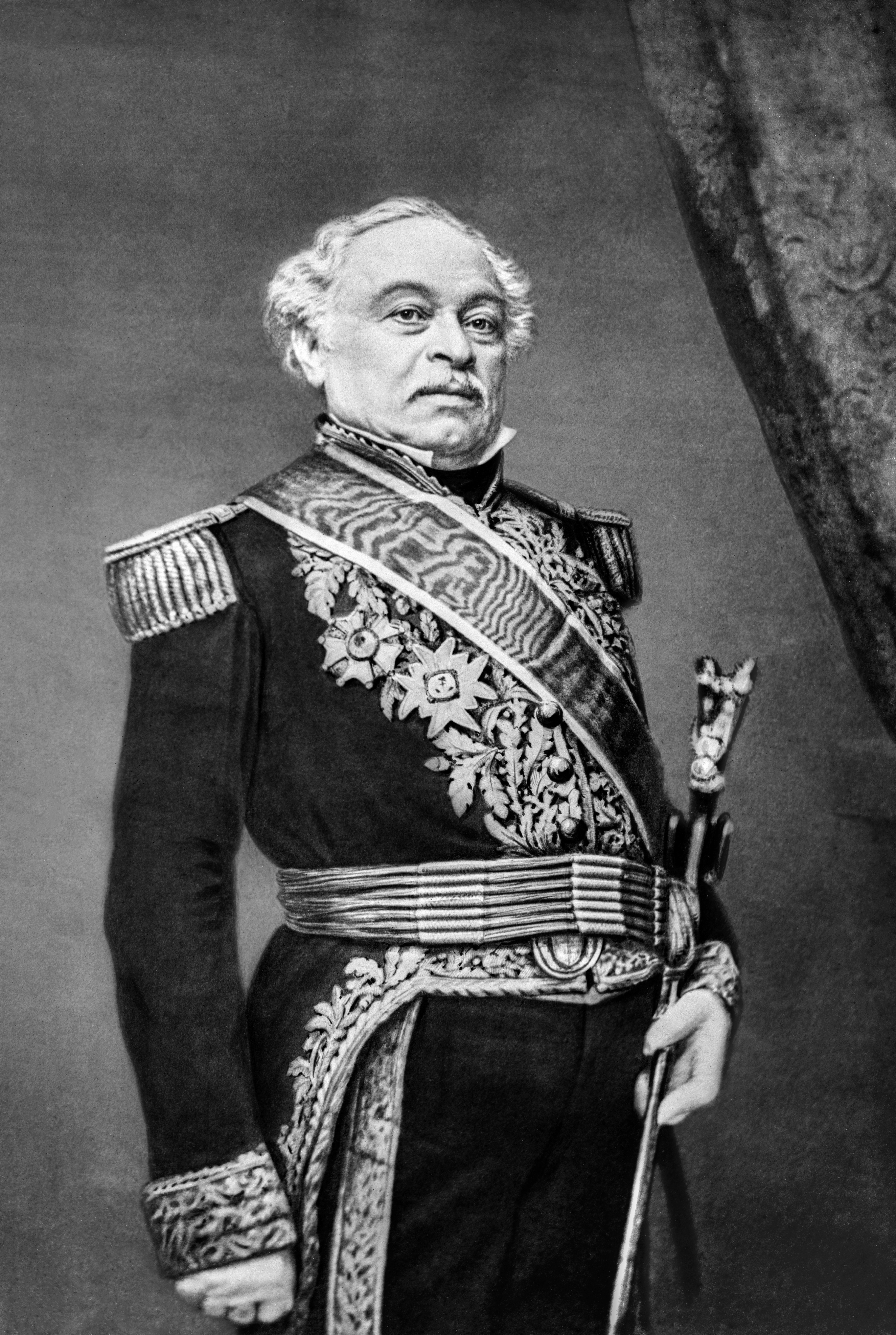 Retrato de José Antonio Páez (1790-1873), Presidente de Venezuela entre 1855 y 1865.